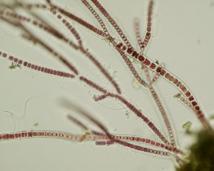 Alga-vermelha marinha (Stylonema alsidii).